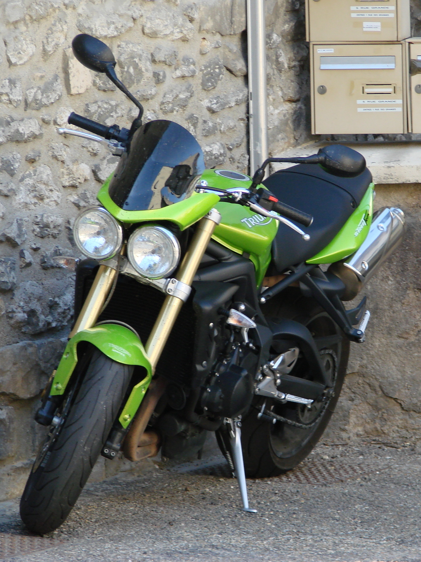 Triumph Street Triple 1